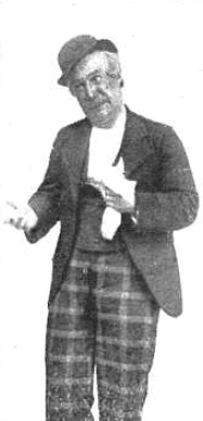 El actor español Enrique Lacasa caracterizado durante su interpretación del sainete musical El paragüero, en 1912.